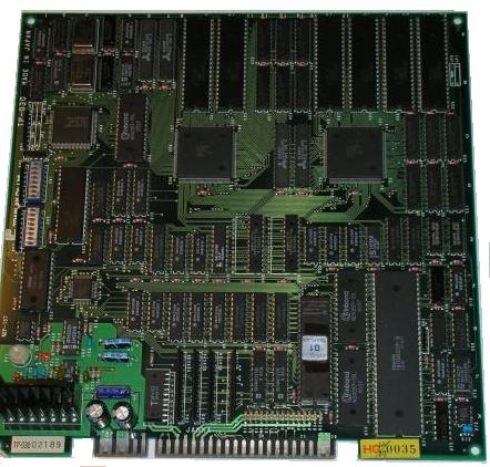 Batsugun arcade PCB